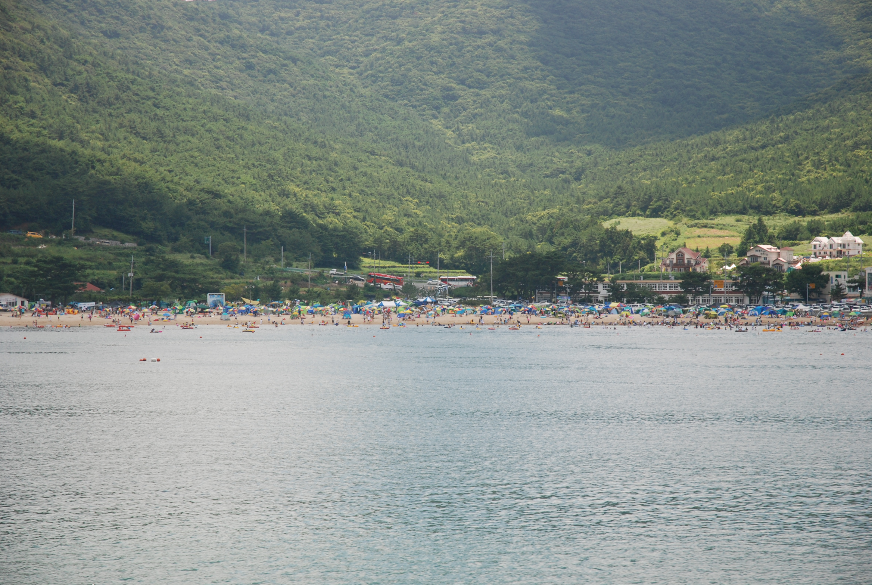 거제 명사 해수욕장